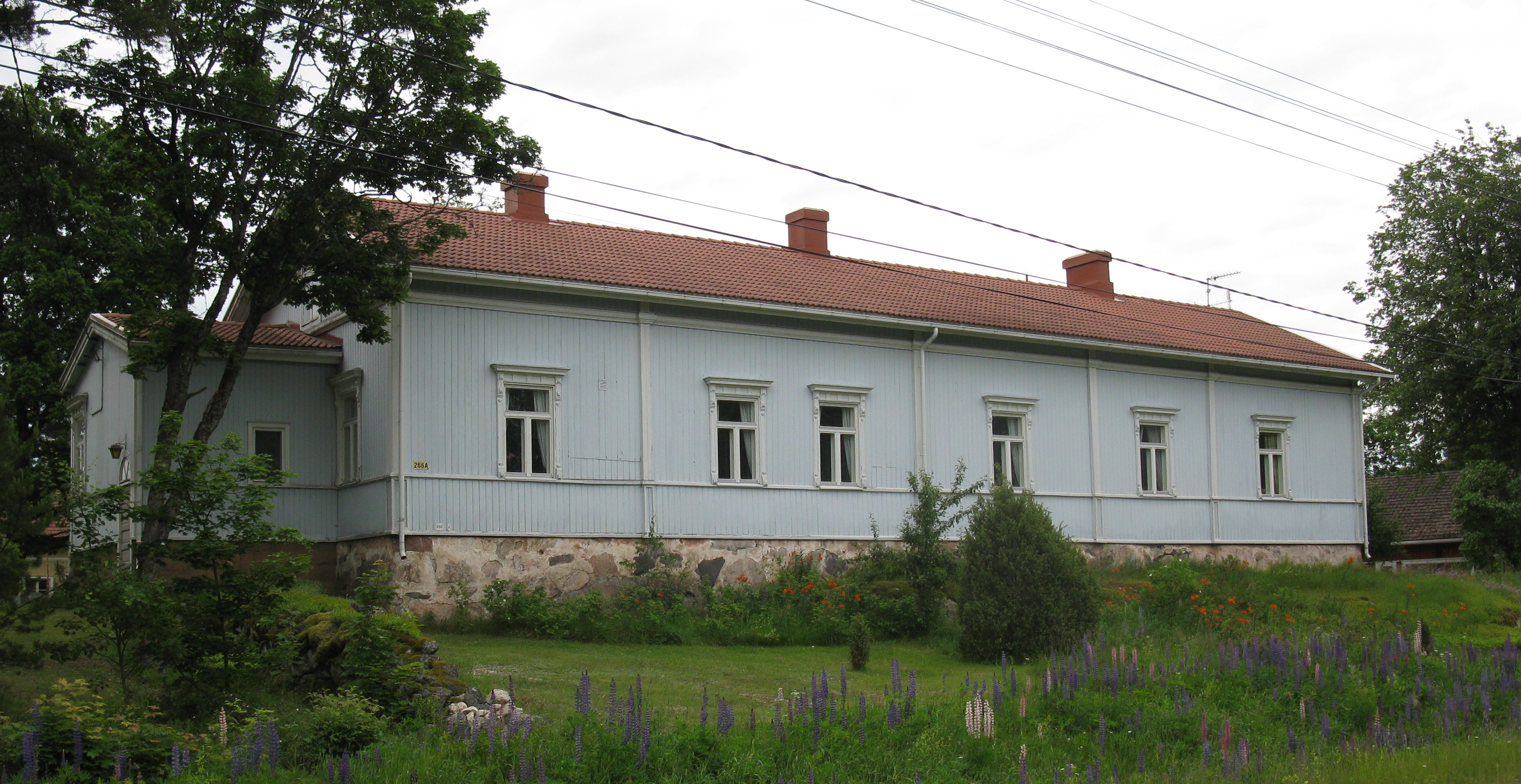 Kiikalan pappila kesäkuussa 2014